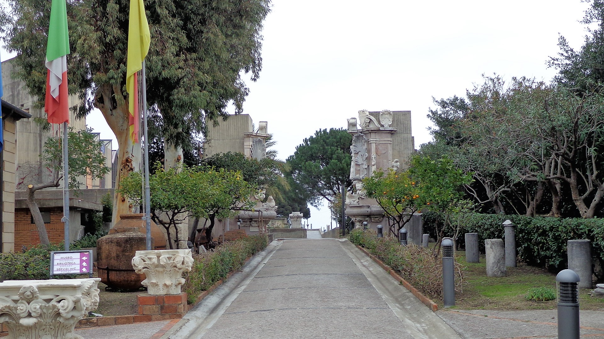 Viale e ruderi delle Quattro Fontane